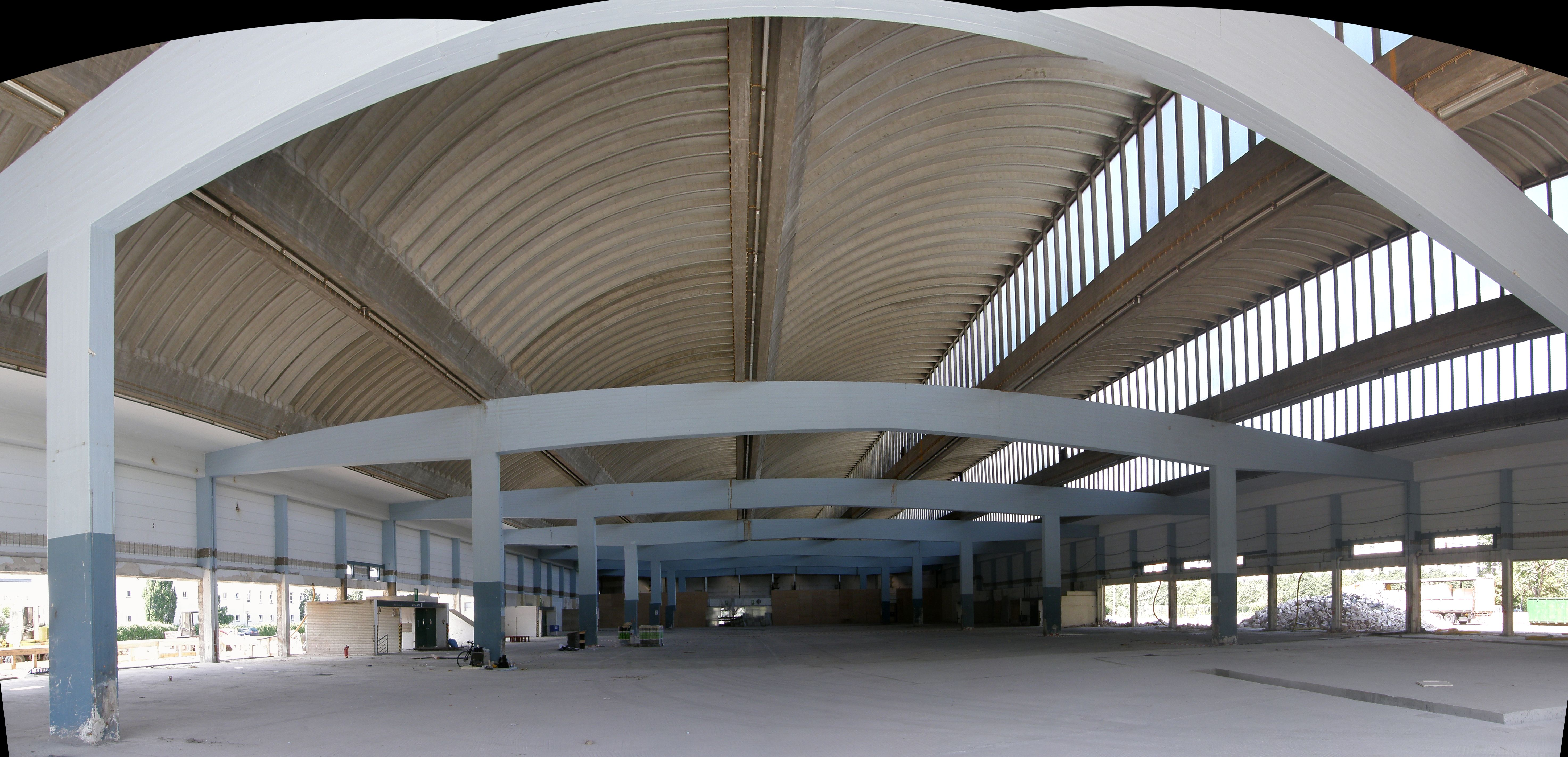 Mitte, Lindenstr., Großmarkthalle, innen